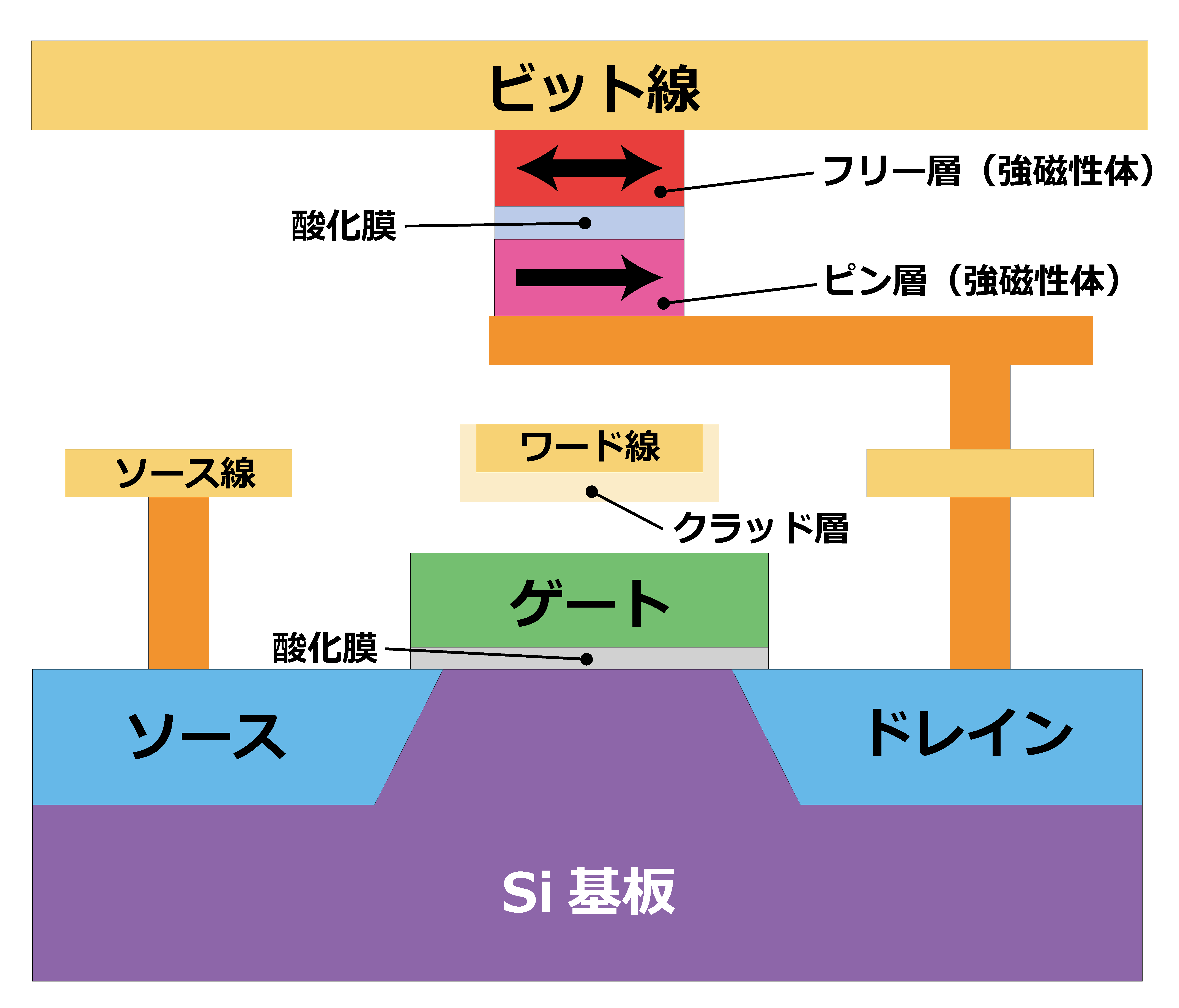 磁界書き込み型MRAMの断面図